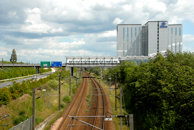 Metro treinstel op 27 mei 2009 te Kastrup, boven de groederen sporen naar Zweden.